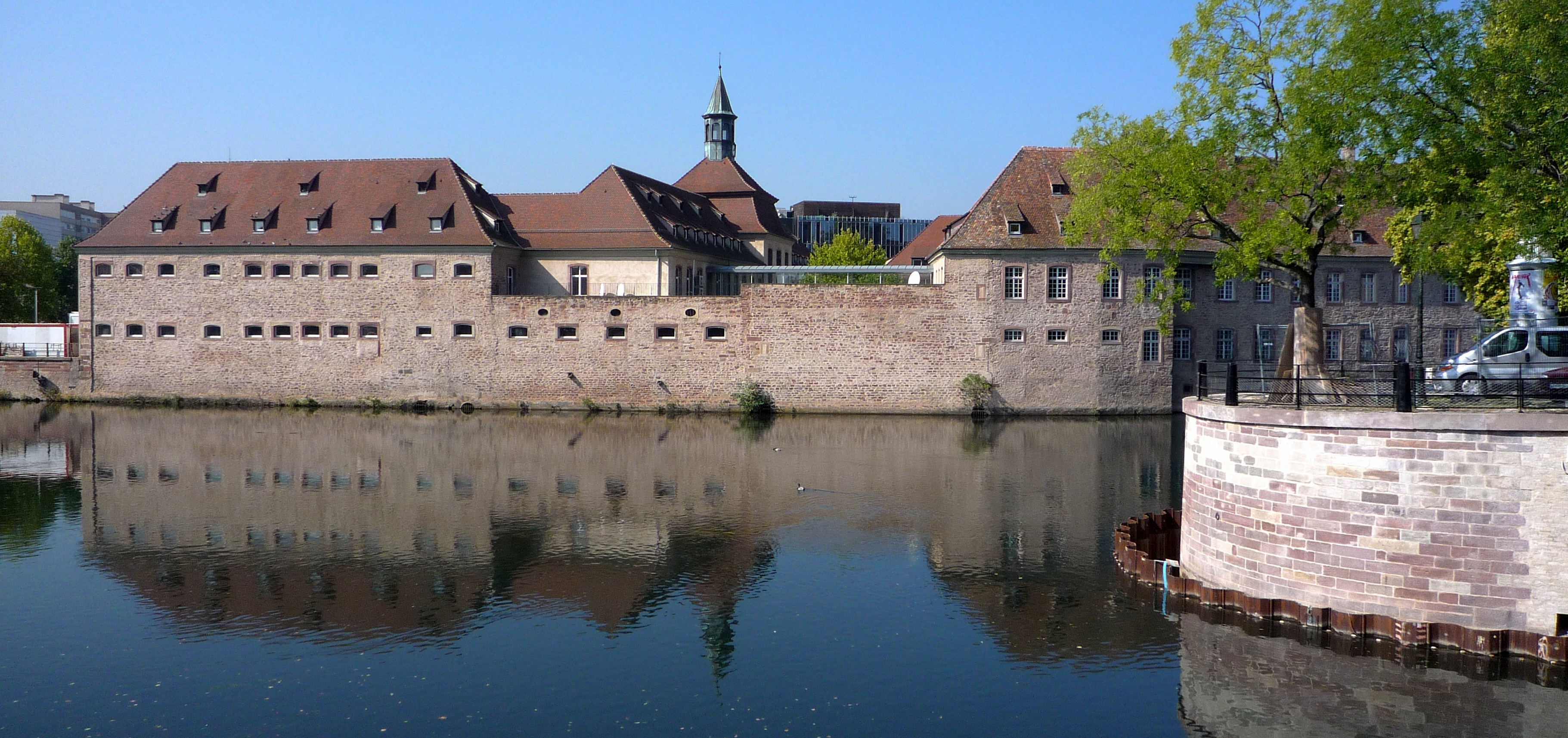 La commanderie des Hospitaliers de Saint-Jean de Jérusalem – dite Commanderie Saint-Jean –, est un bâtiment de la ville de Strasbourg, situé au 1, rue Sainte-Marguerite et dont la construction s’est échelonnée de la première moitié du XIVe siècle à la première moitié du XVIIIe siècle. Il est classé Monument historique depuis 1971. La commanderie fut successivement un lieu de commerce et de diplomatie, un hôpital puis entre 1740 et 1989, la maison d’arrêt Sainte Marguerite. Après restauration et restructuration, elle accueille l’École nationale d’administration (ENA) depuis 1991.